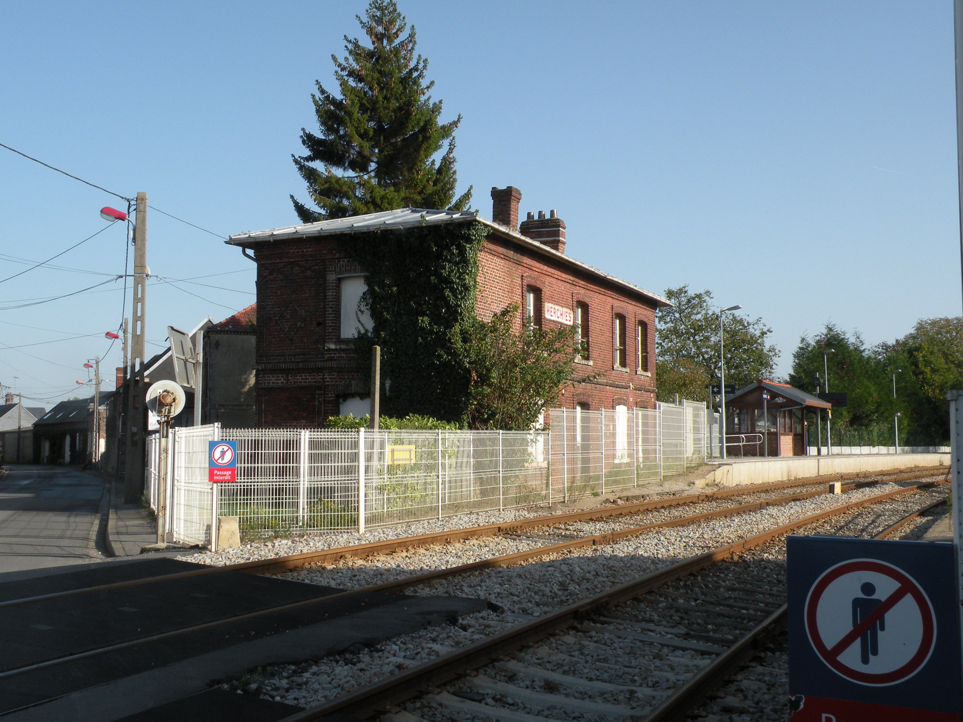 gare de Herchies